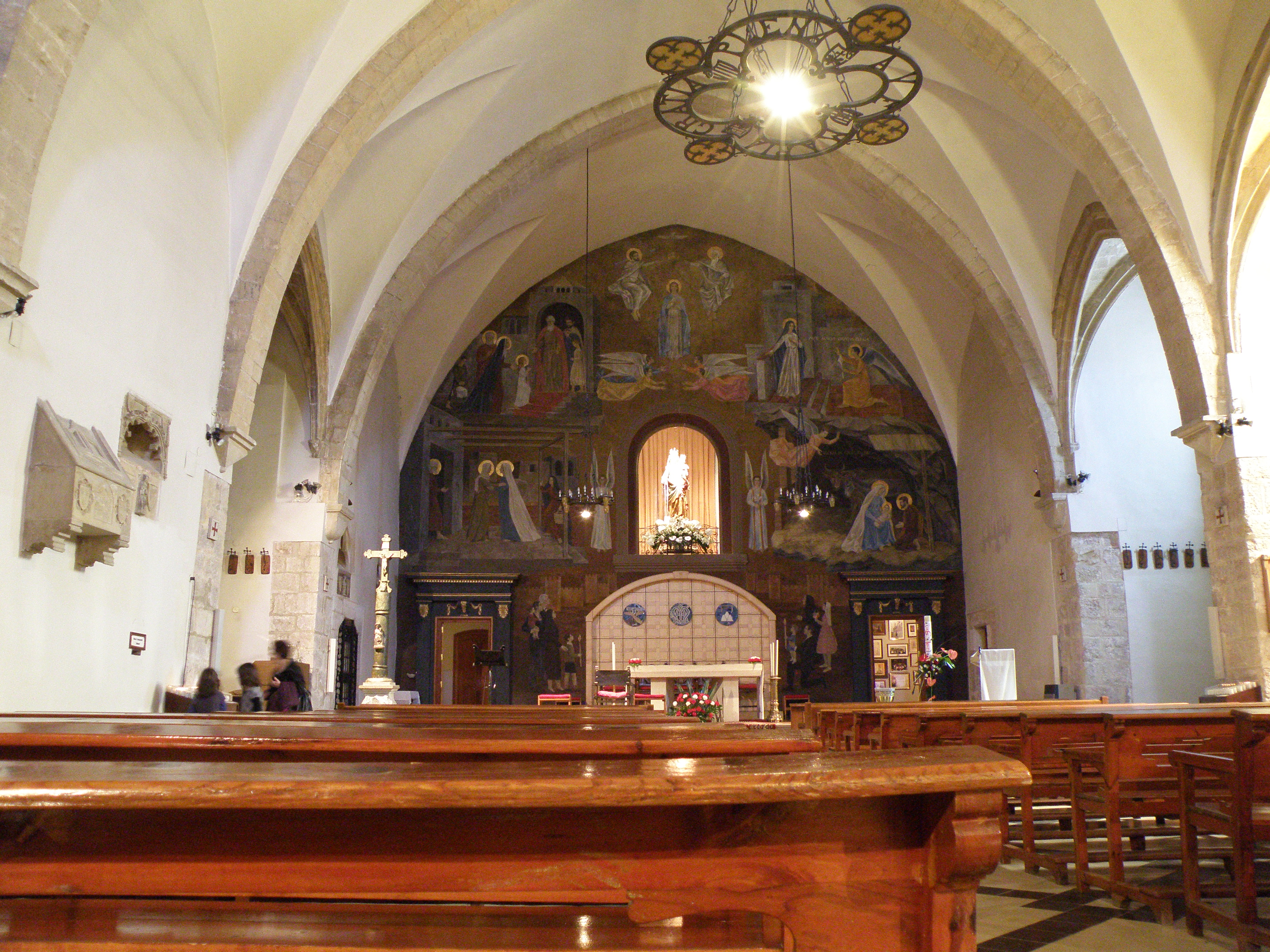 Interior del Santuari de la Mare de Déu de la Serra a Montblanc a la Conca de Barberà, Tarragona